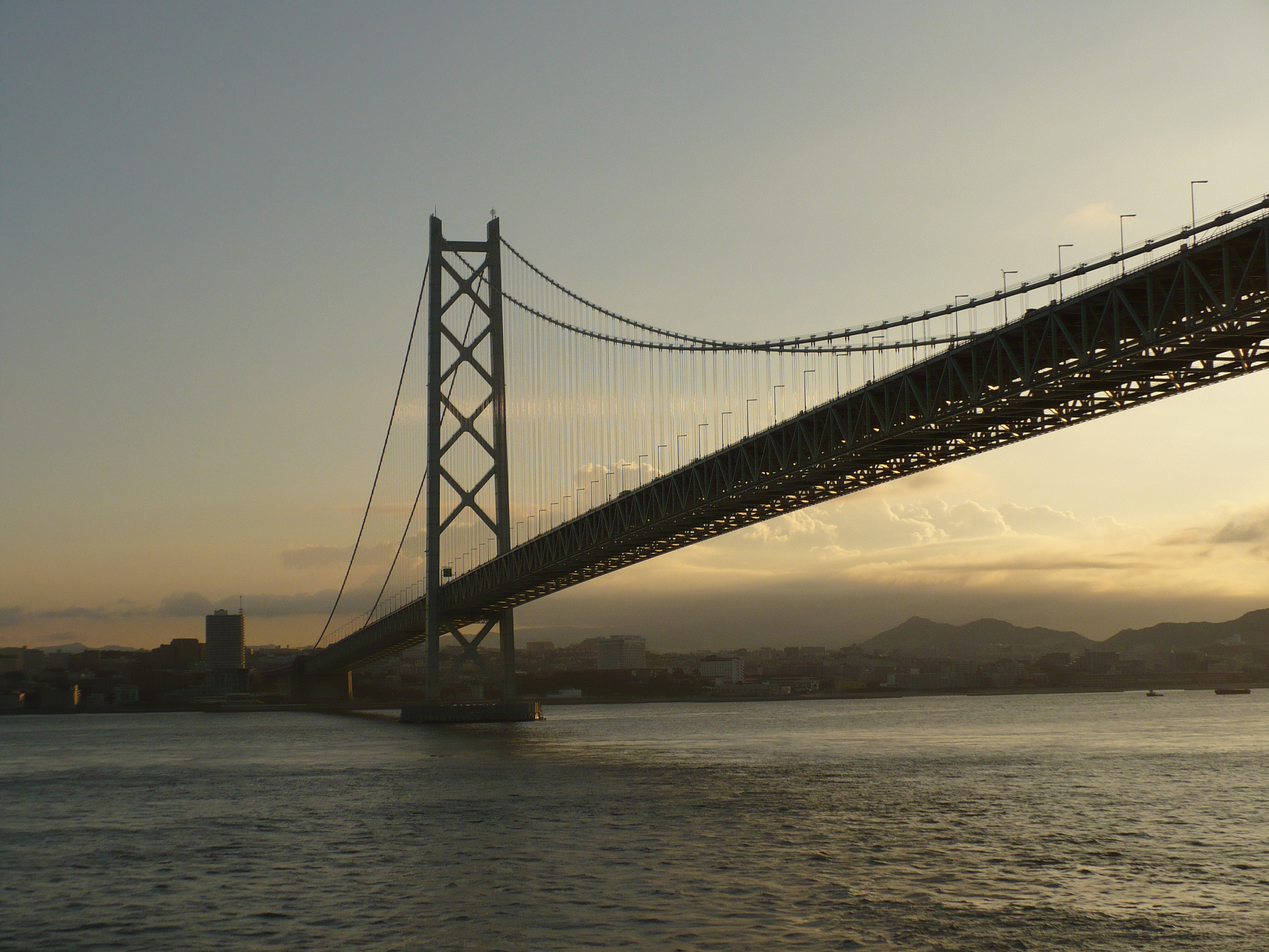 船からの明石海峡大橋